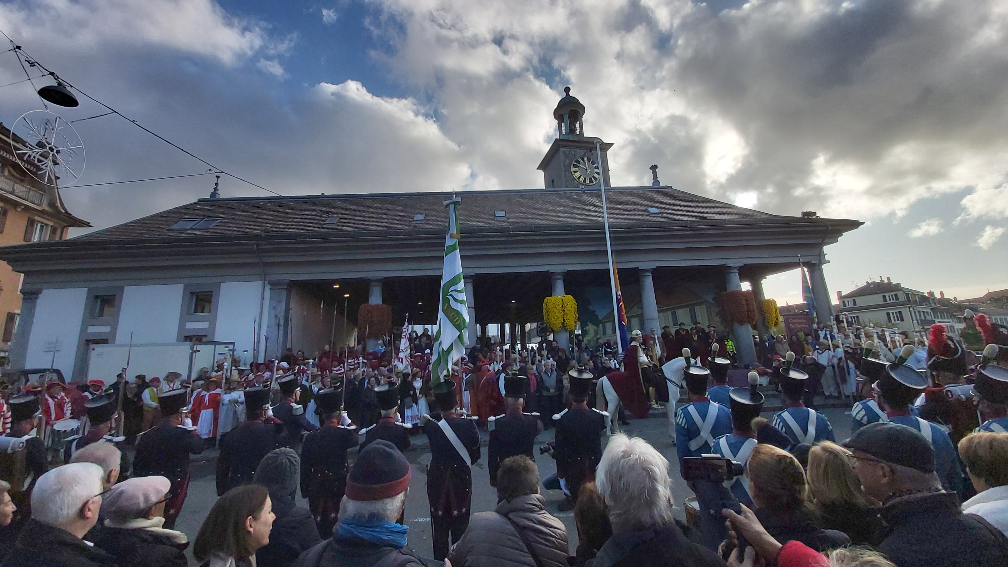 Proclamation de l'ouverture de la Foire, message des Autorités, partage du manteau de Saint-Martin et intronisation des Consœurs et Confrères (selon programme 2019)